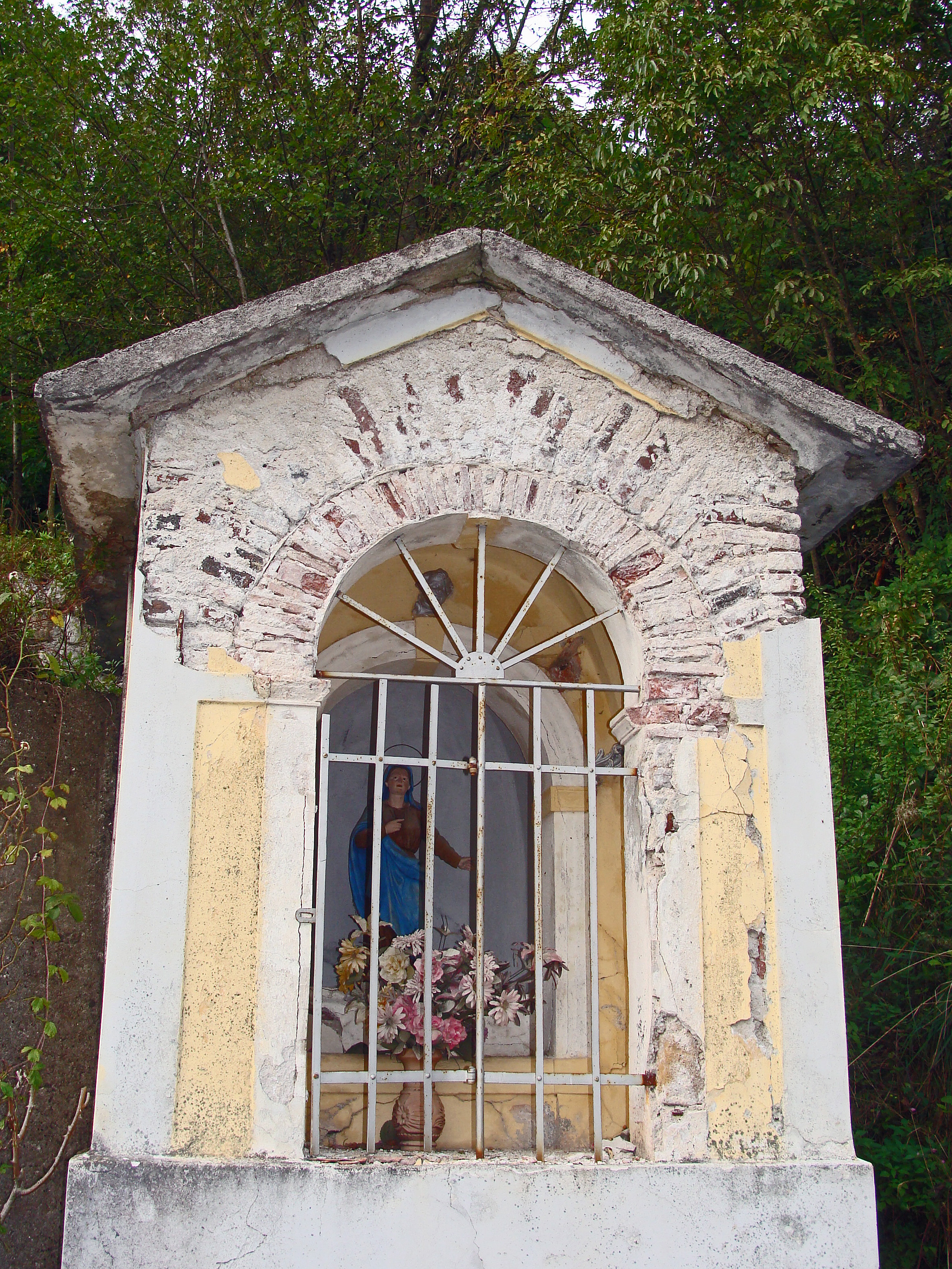 petite chapelle située à Micottis, commune de Lusevera (province d'Udine, Italie) avec statue de la vierge. Photographie prise en 2012.